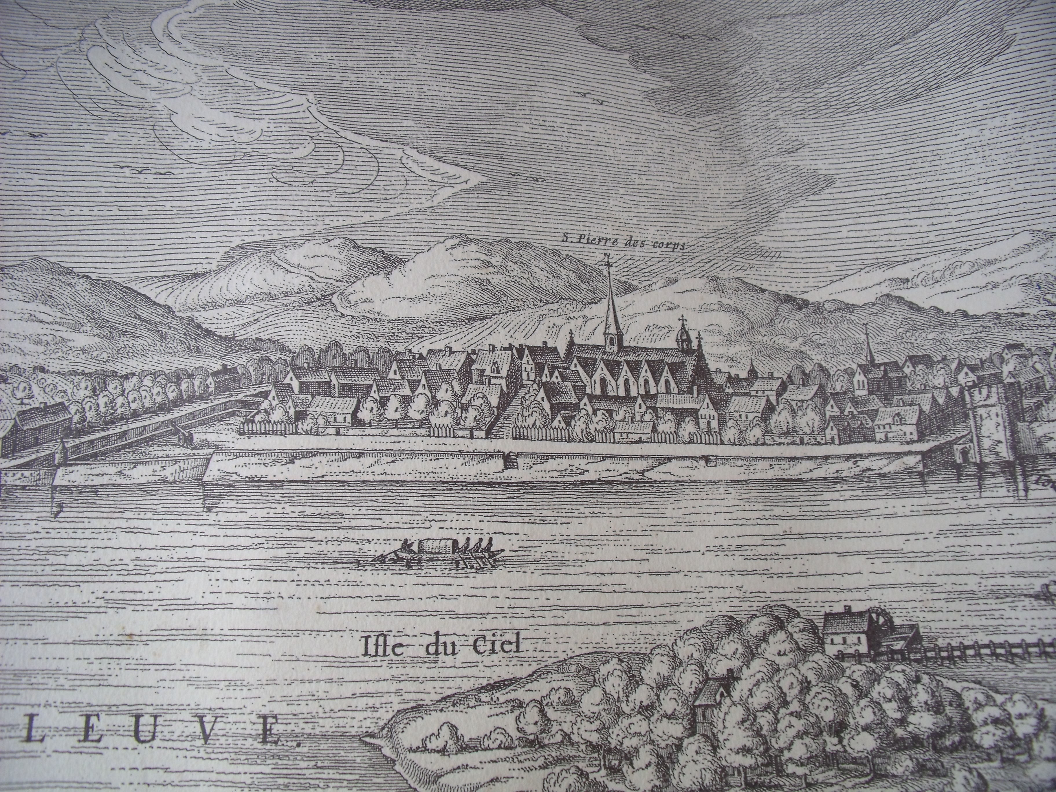 Quartier saint pierre des corps Blanqui, extrait de l'estampe gravé par monsieur LAES JANSZ VISSCHER en 1625 tiré d'un original sur vélin de 2.35 m sur 41 cm, propriété de desprez37